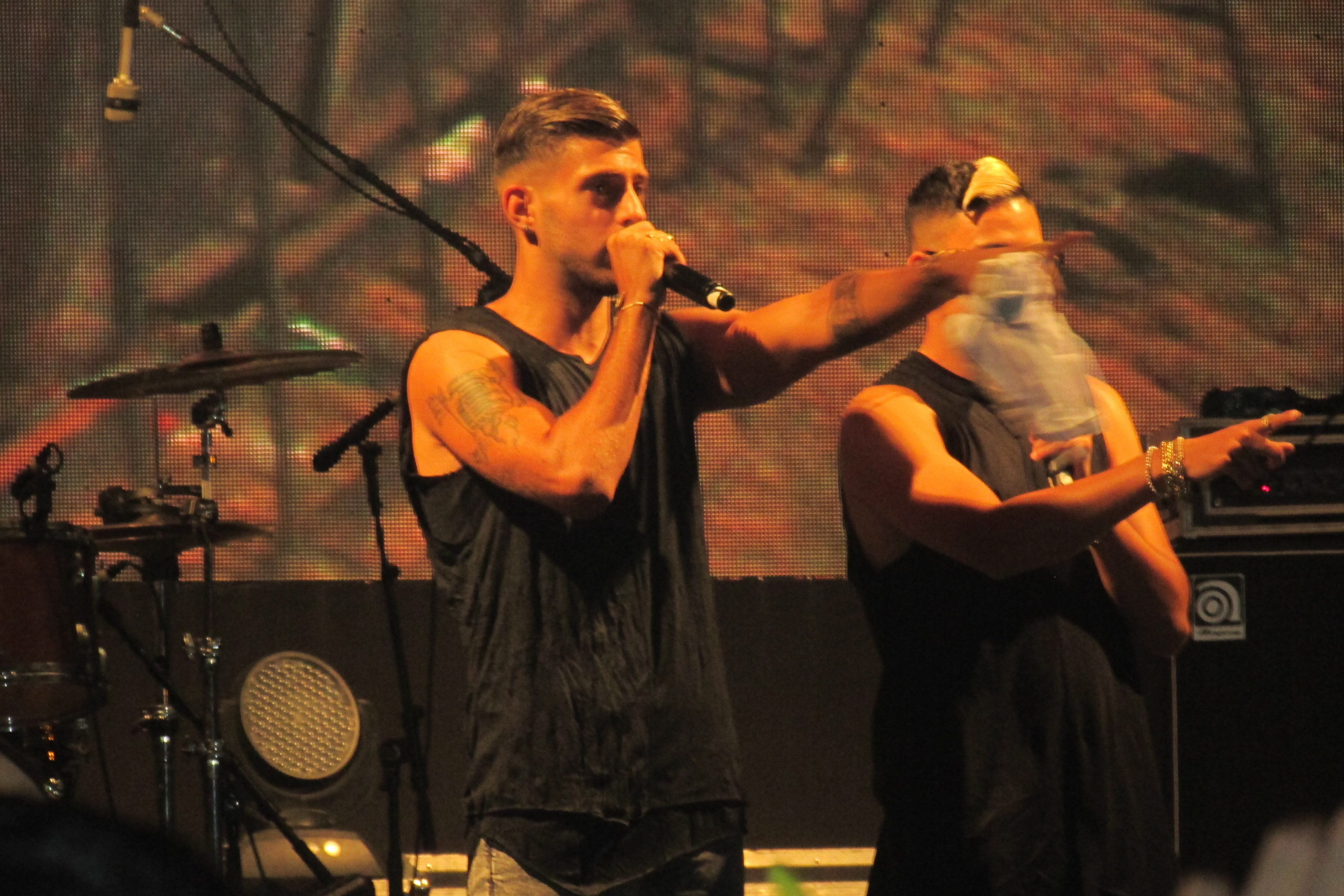 Ben-El Tavori live at Kiriat Ata (30 August 2016)